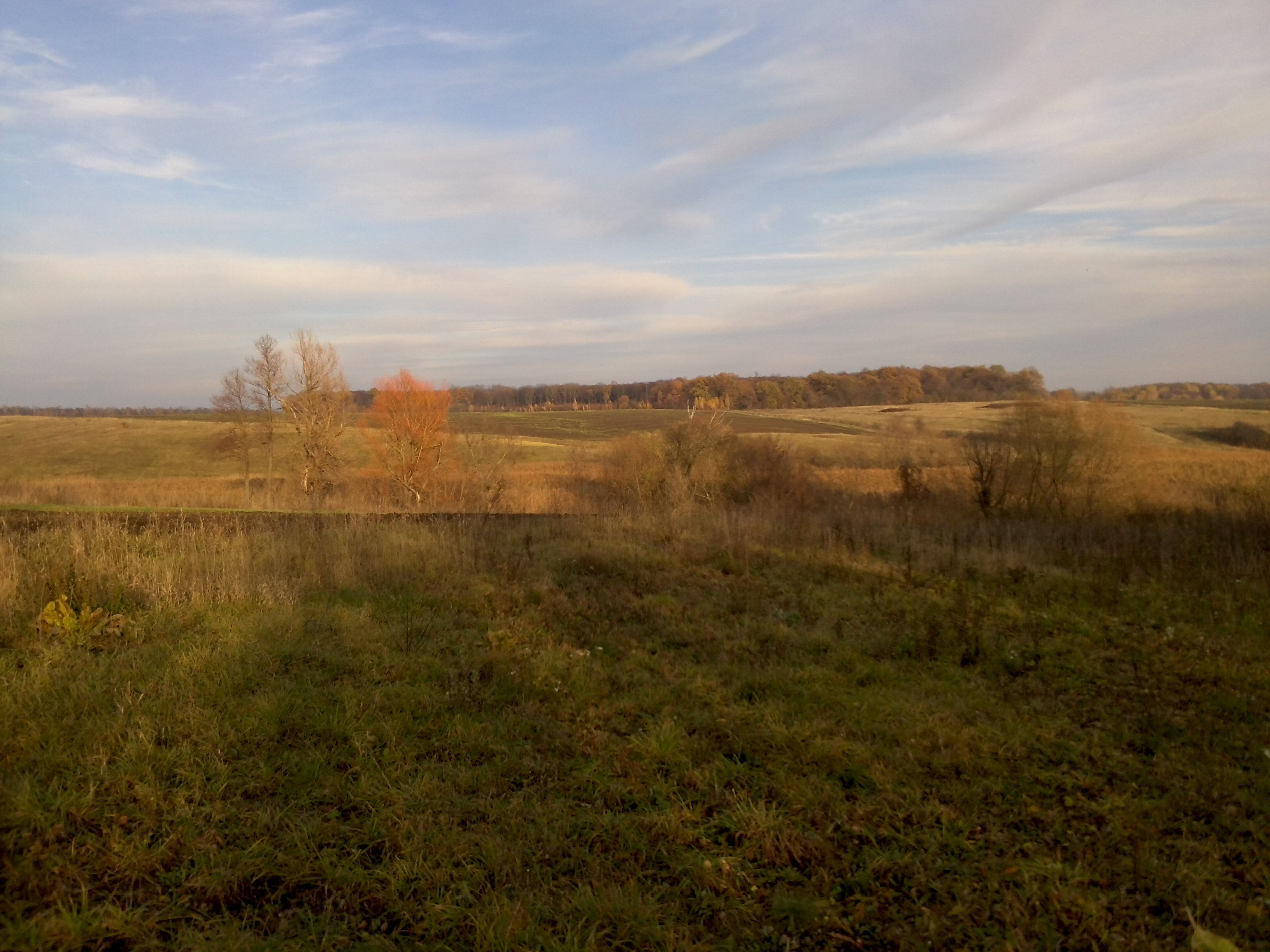 с-ще Ксаверівка